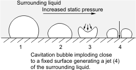 Cavitation bubble implosion